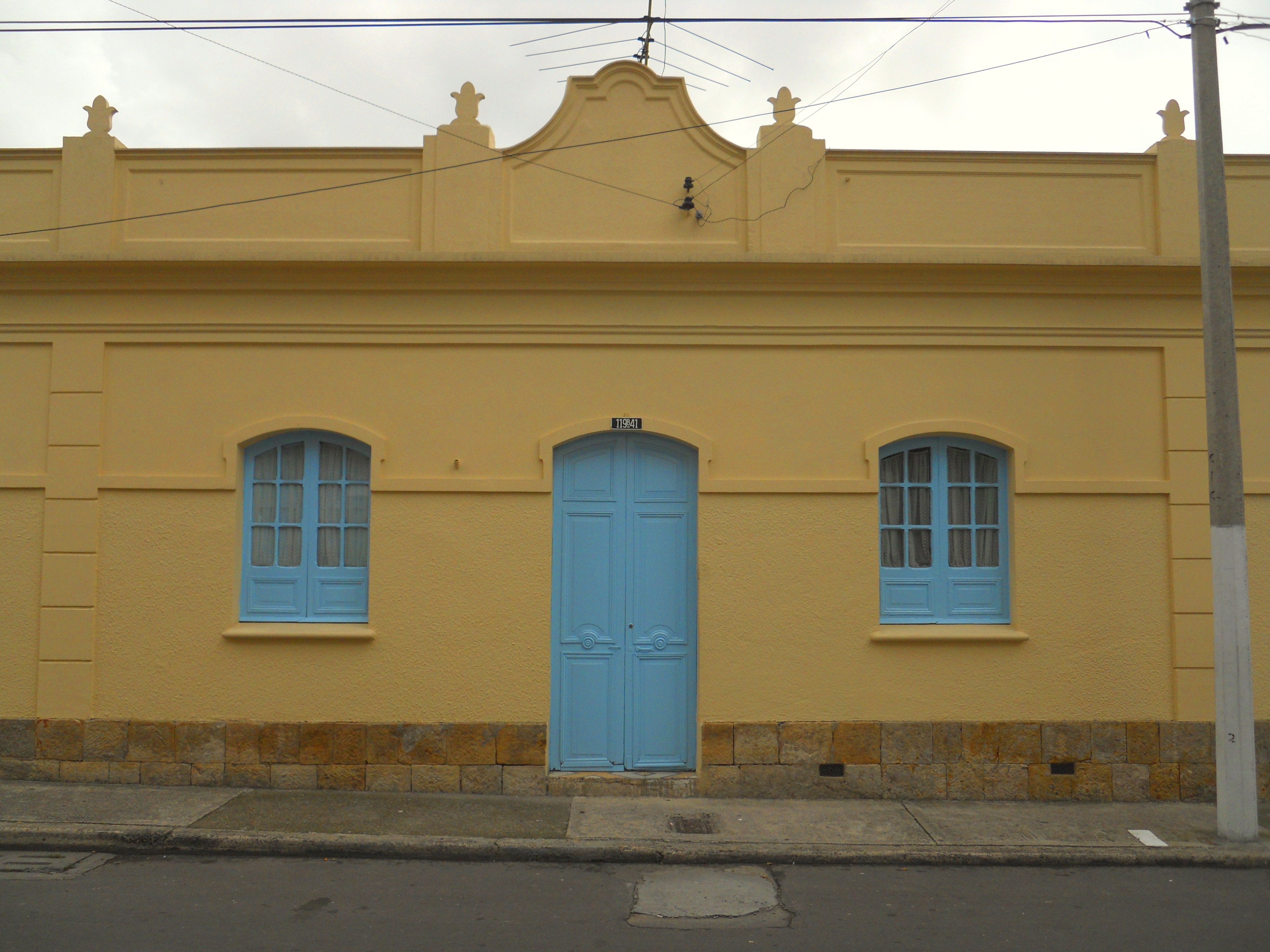 Usaquén Casa en la carrera Sexta con calle 119b.